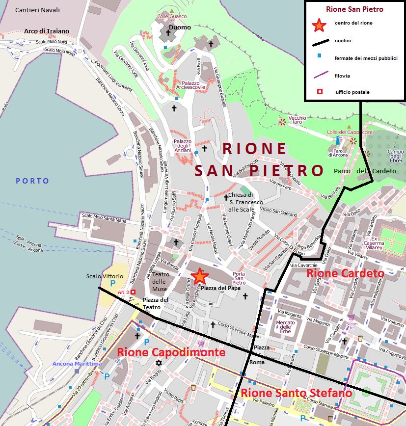 Mappa del Rione San Pietro di Ancona, con i confini, le vie, le piazze e i parchi.